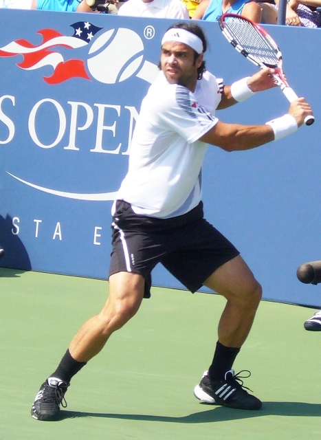 2009 US Open